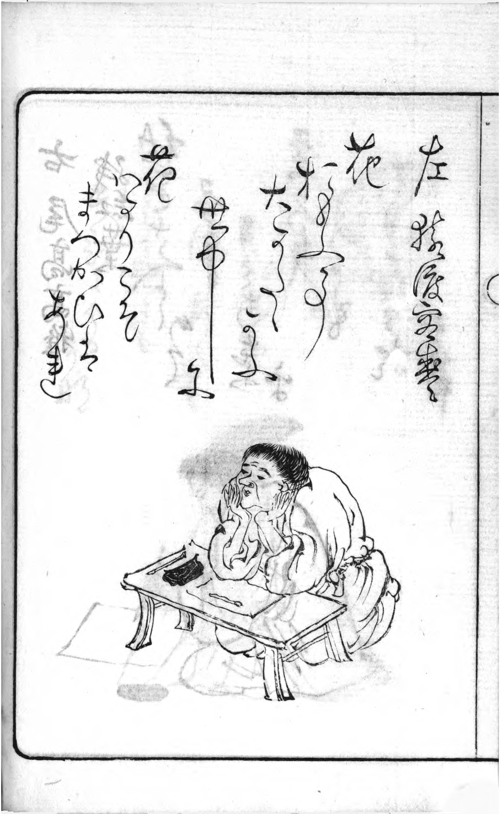 左 猿渡容盛 花 おもふ事 大かたたゝふ 世中に 花はかりこそ まつかひはあれ